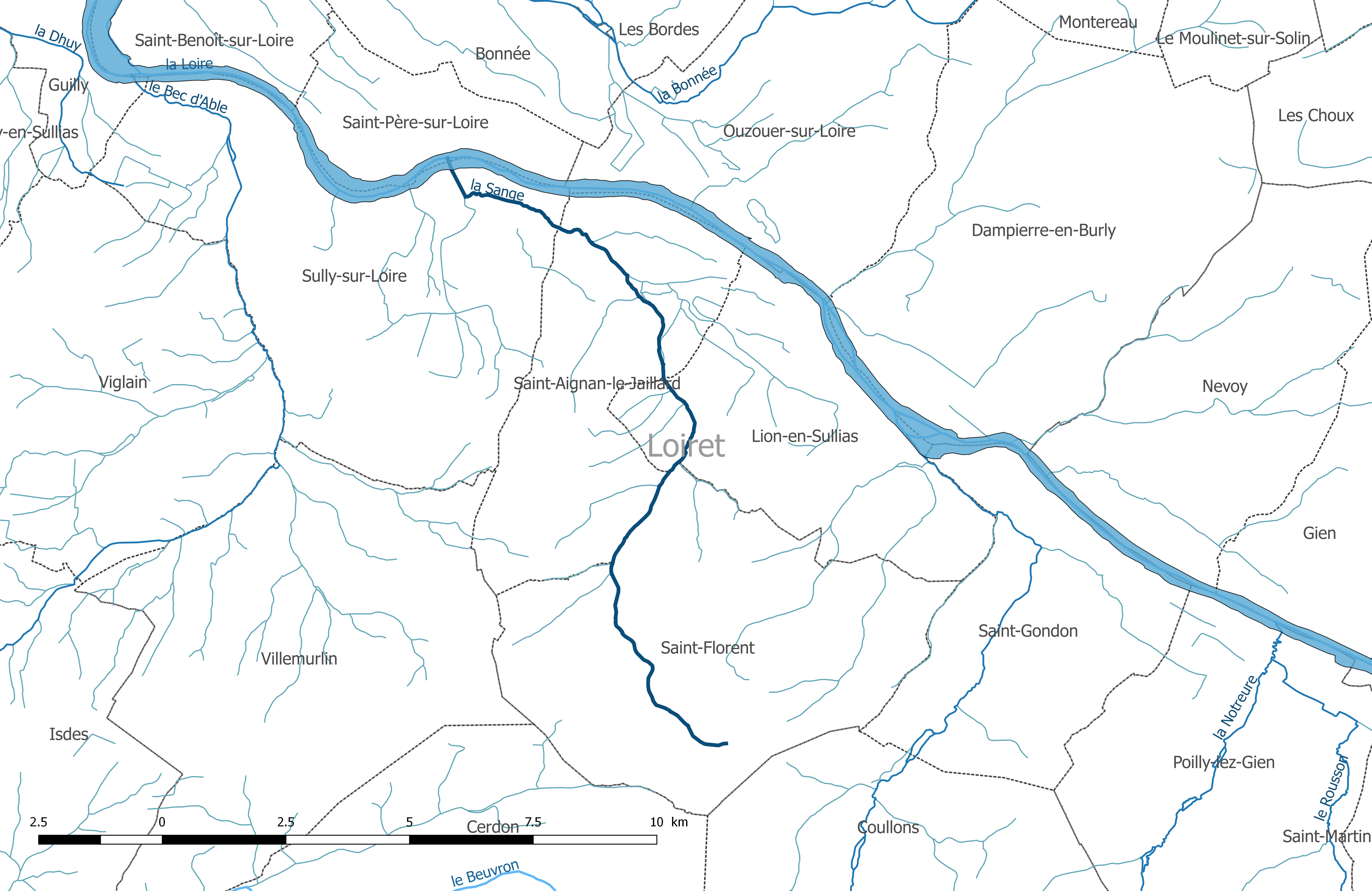 Carte du cours d'eau "la Sange", dans le département du Loiret.